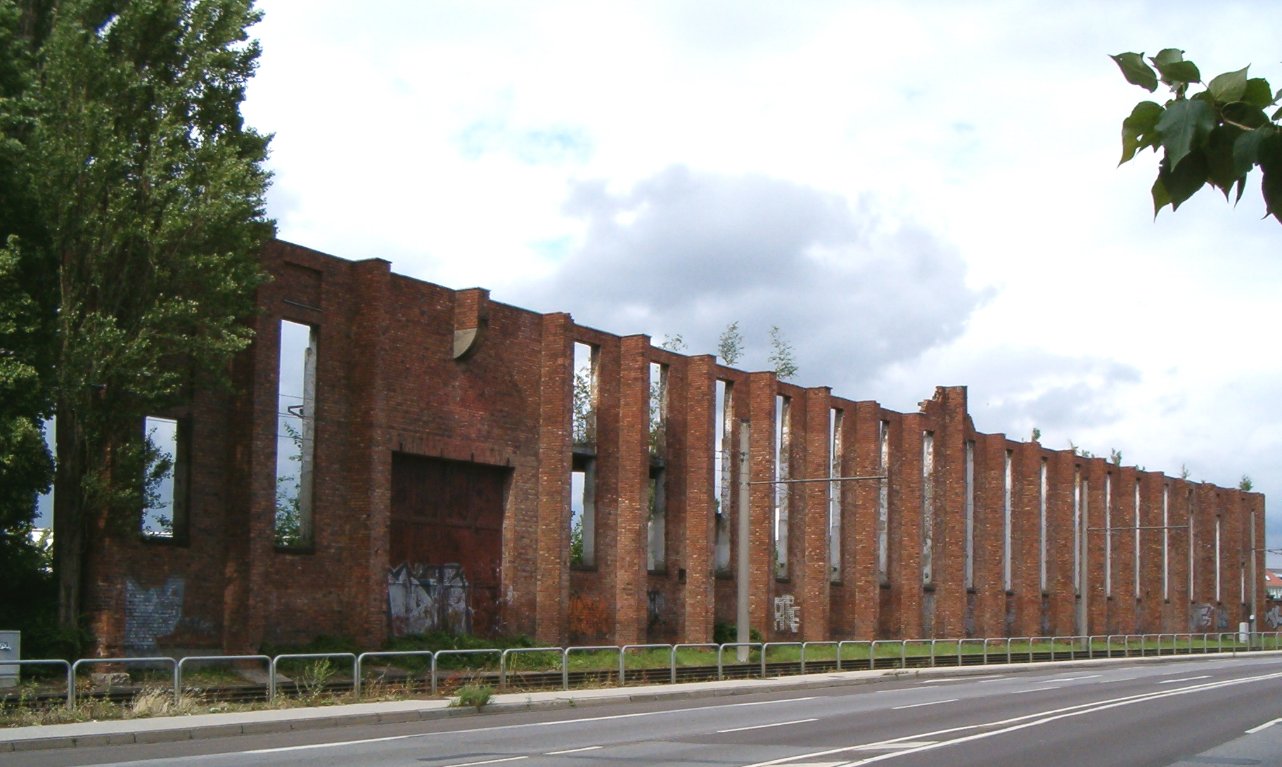 Ruinen Heinkelwerk Rostock